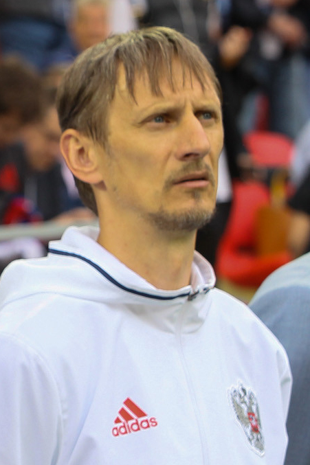 Россия - Чили